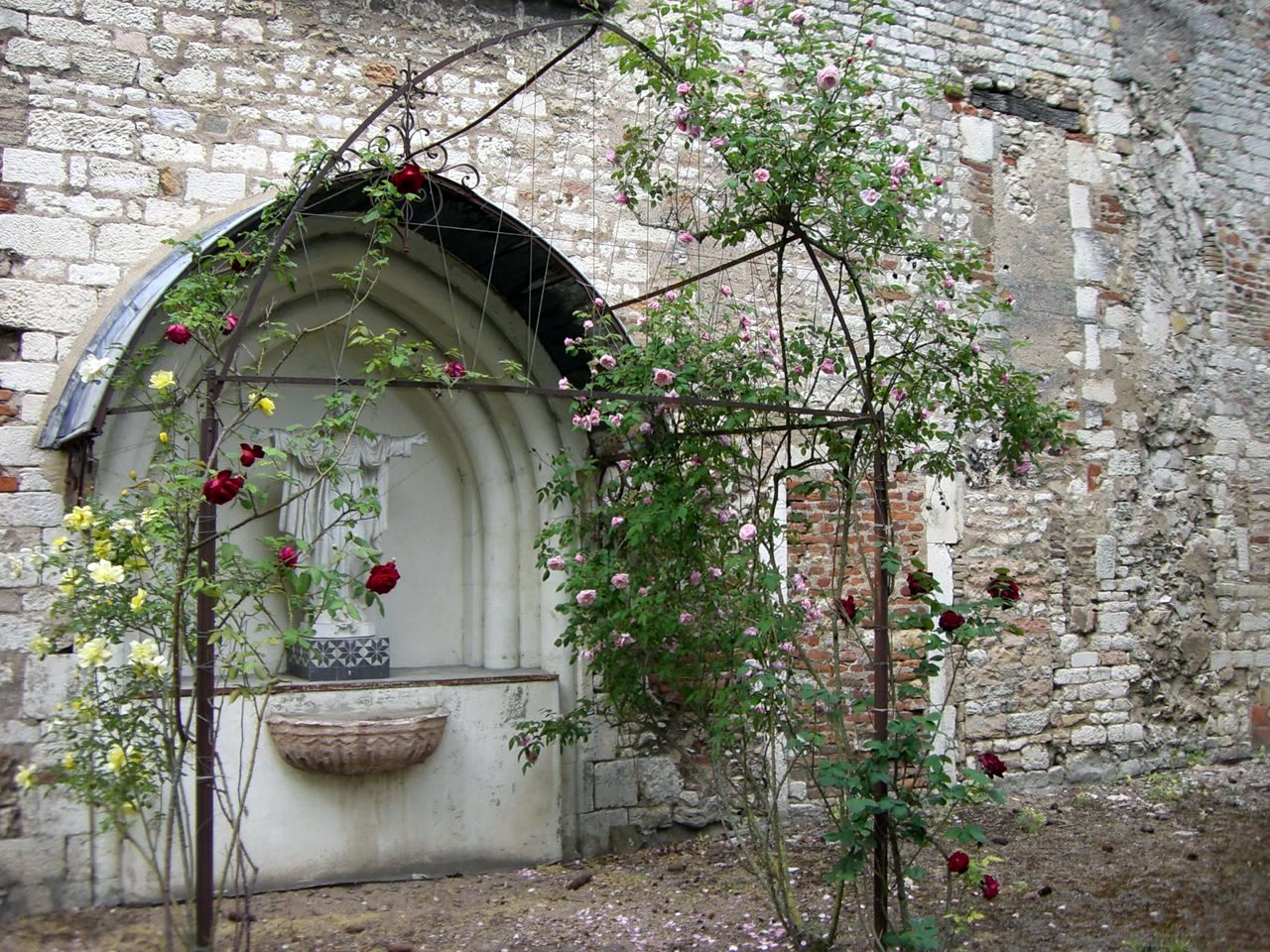 Rechte Außenwand der Prioratskirche von Saint-Marcel bei Chalon-sur-Saône, Ort des in der Französischen Revolution untergegangenen Priorats.